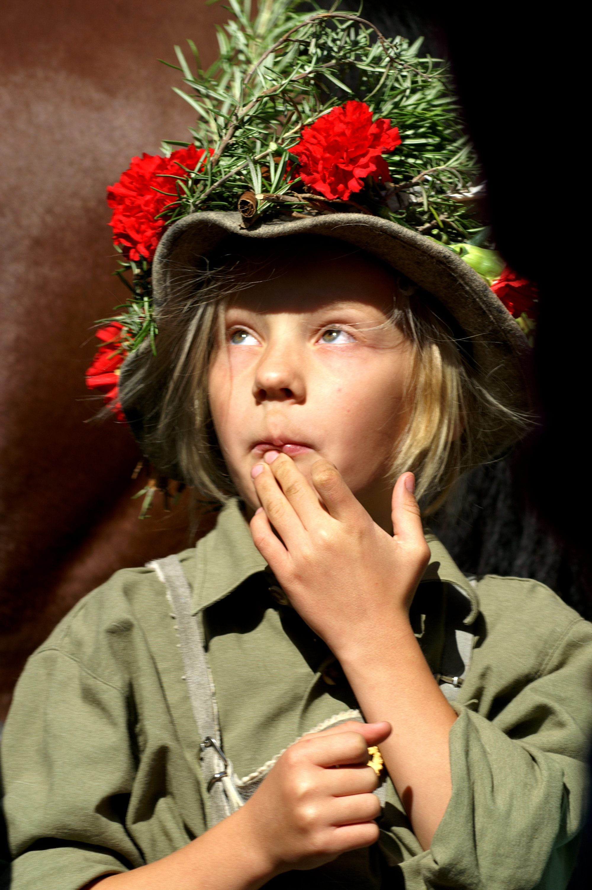 Der Schwarzenberger Alptag mit dem traditionellen Almabtrieb am 15.September.Den Hut des Älpler´s ziert Rosmarin und rote Nelken.